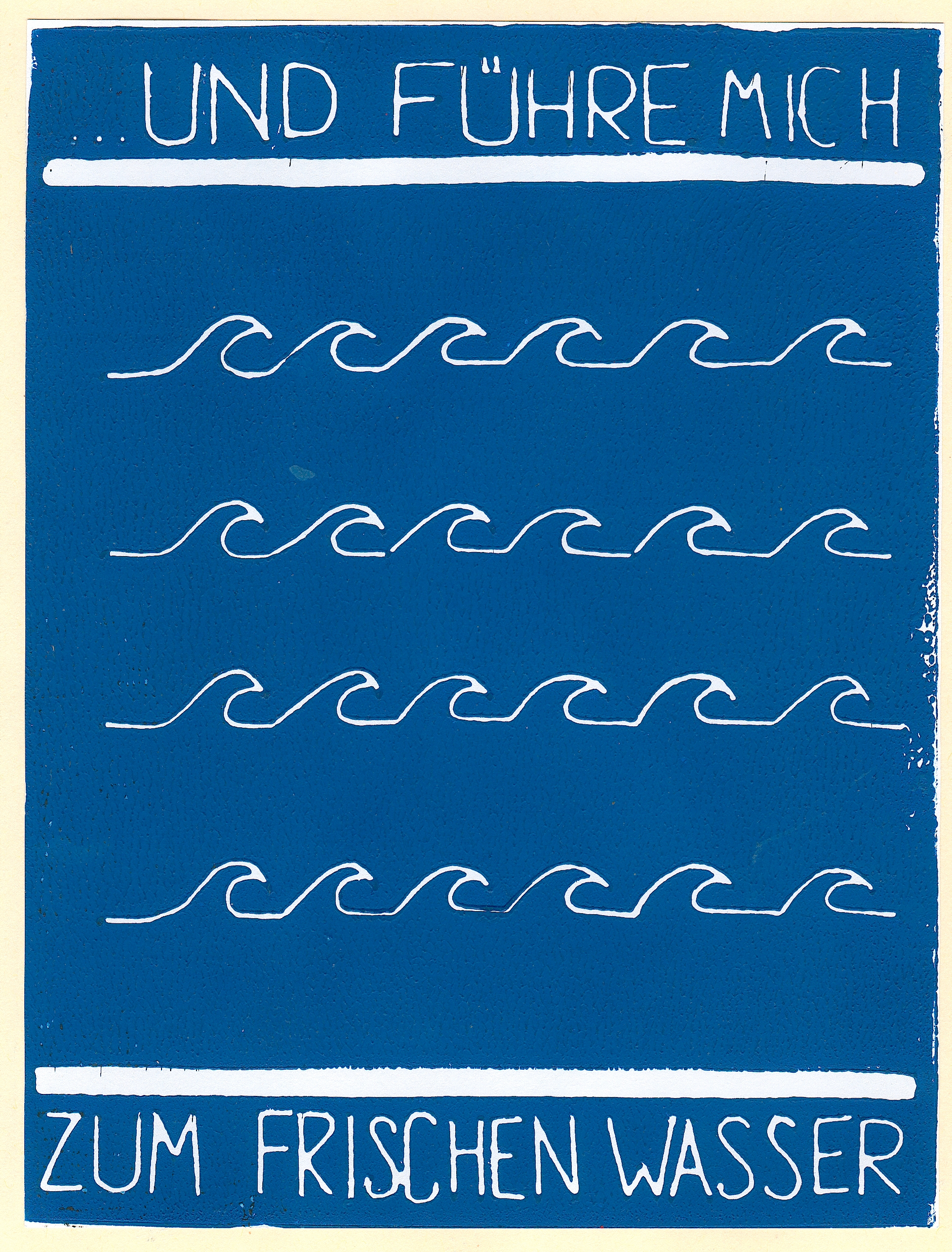 Linolschnitt